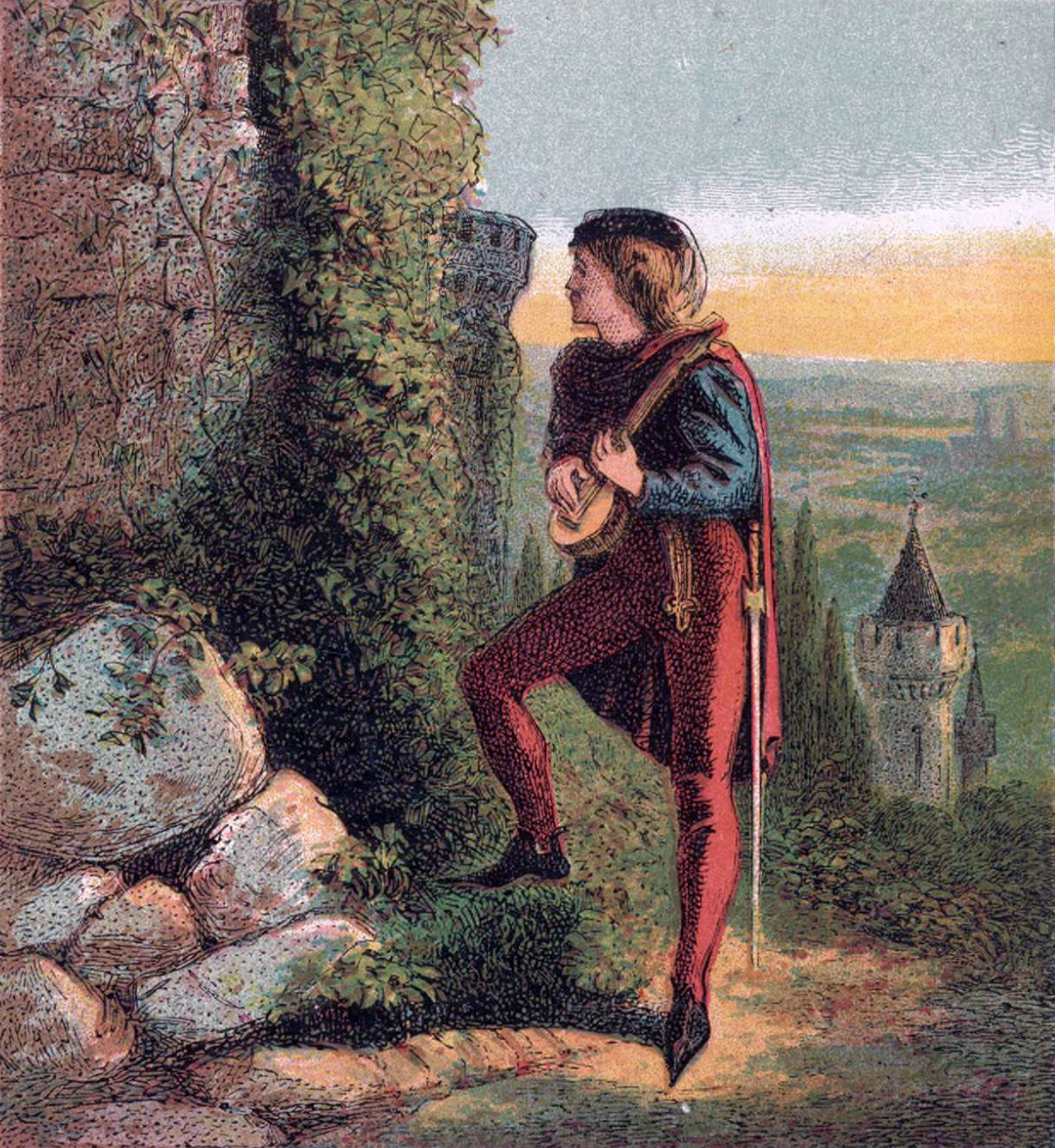 Blondel de Nesle visits King Richard's prison.